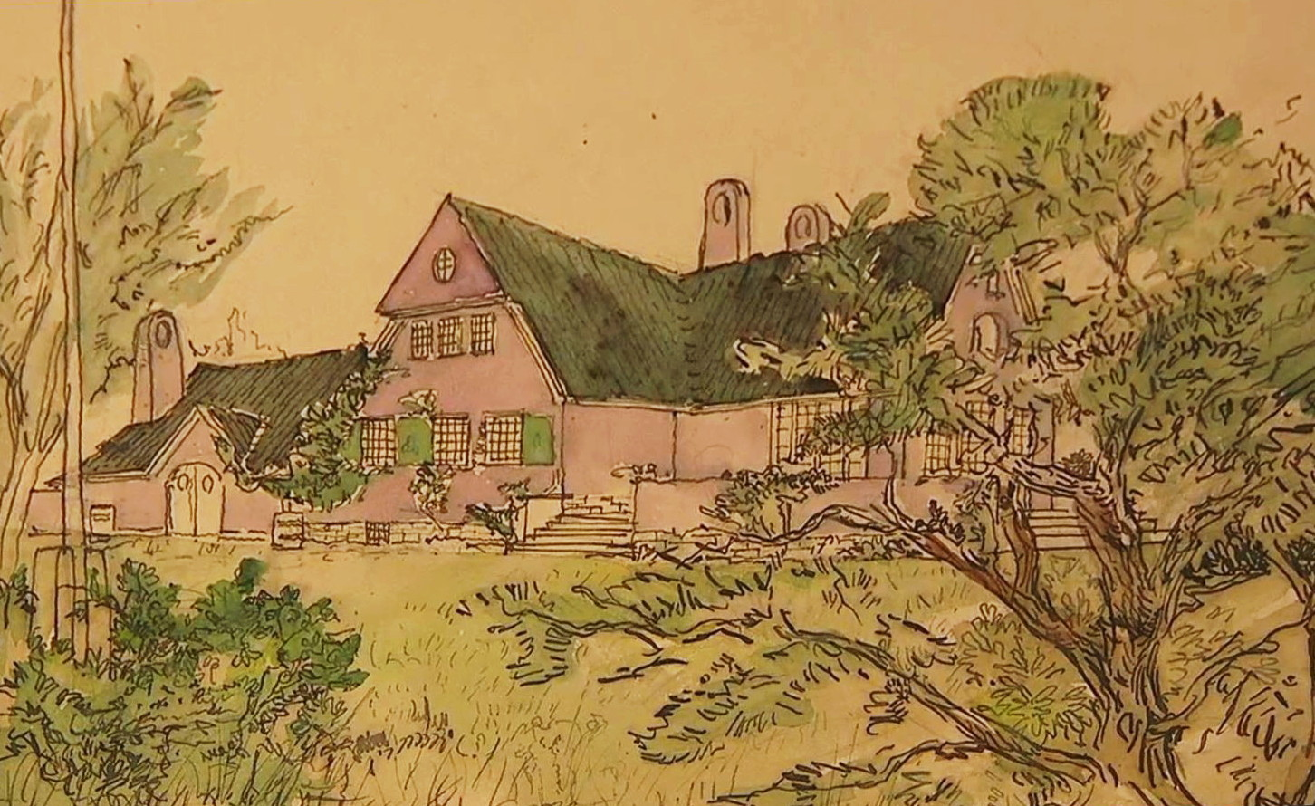 Arkitekt Alfred Grenanders villa "Tångwallen" i Falsterbo